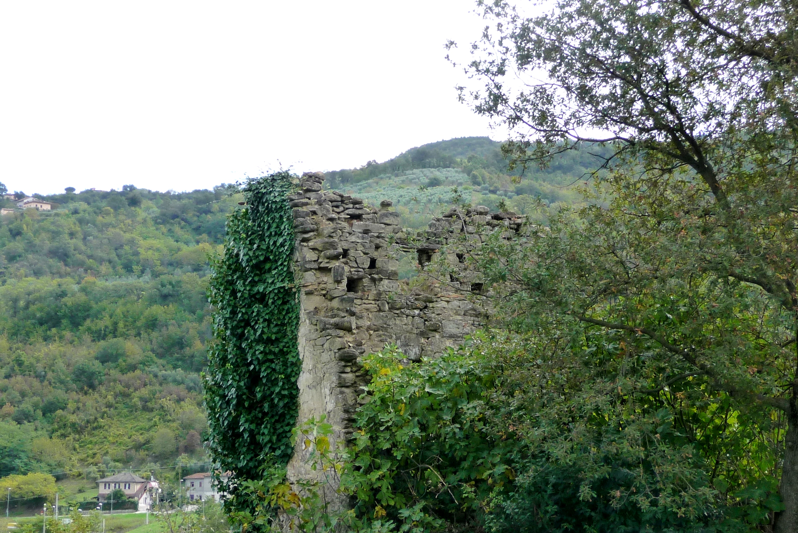 Foto dei ruderi di Castel Mozzano (AP)